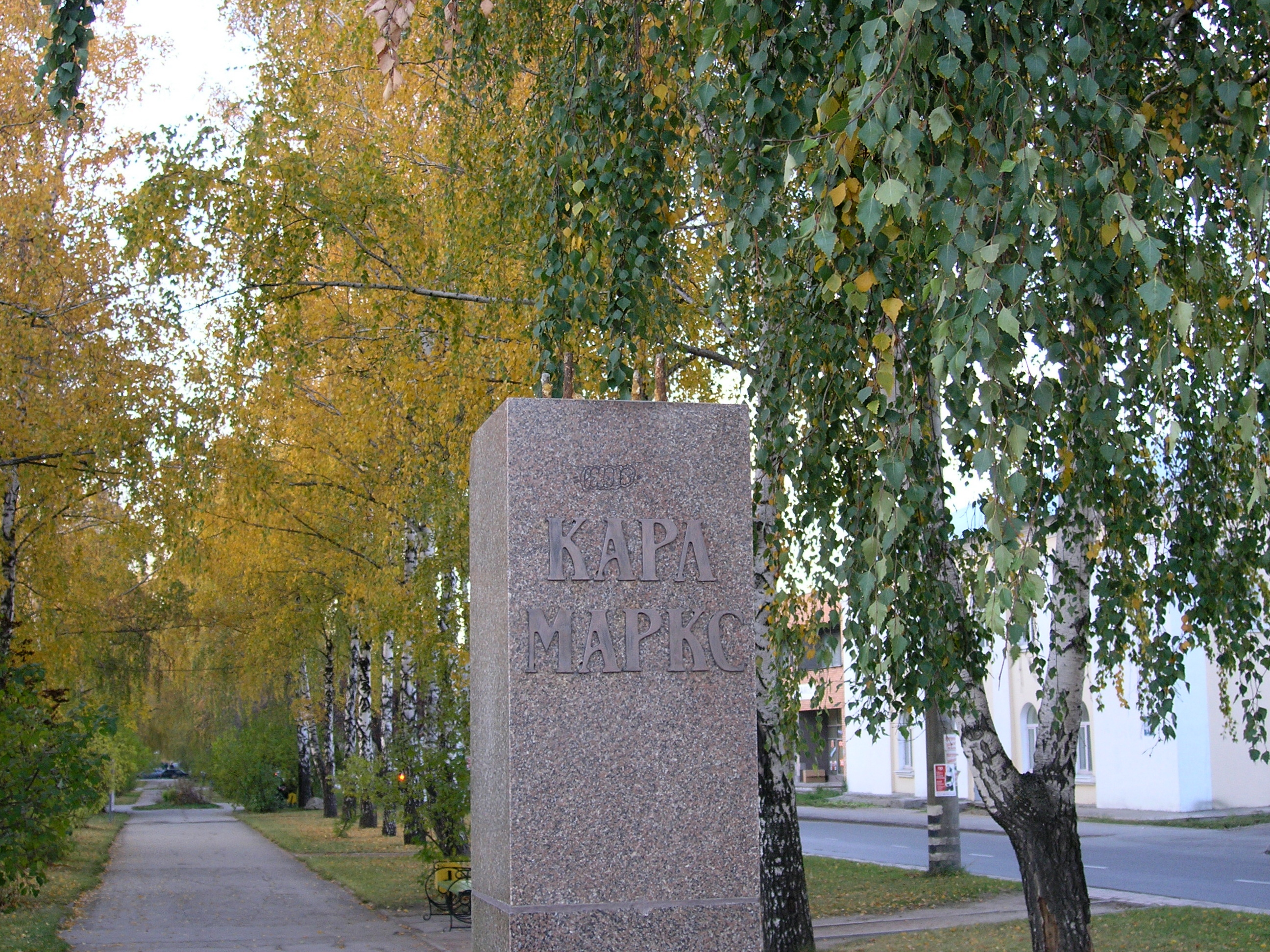 То, что осталось от памятника Карлу Марксу после вандального хищения бюста, произошедшего в конце августа 2007 года. Позднее памятник был восстановлен.